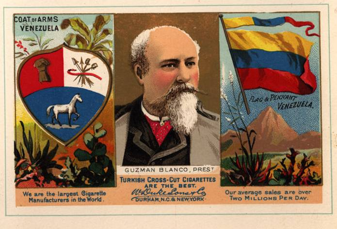 Guzmán Blanco Postcard